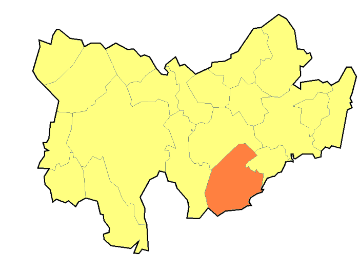 Hranice Snovídky (Vyškov-(Bučovice)- czech republic)